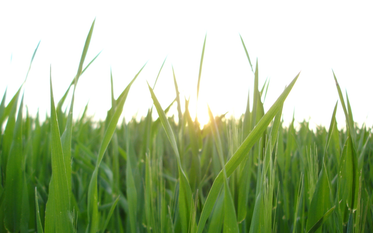 Sunrise.